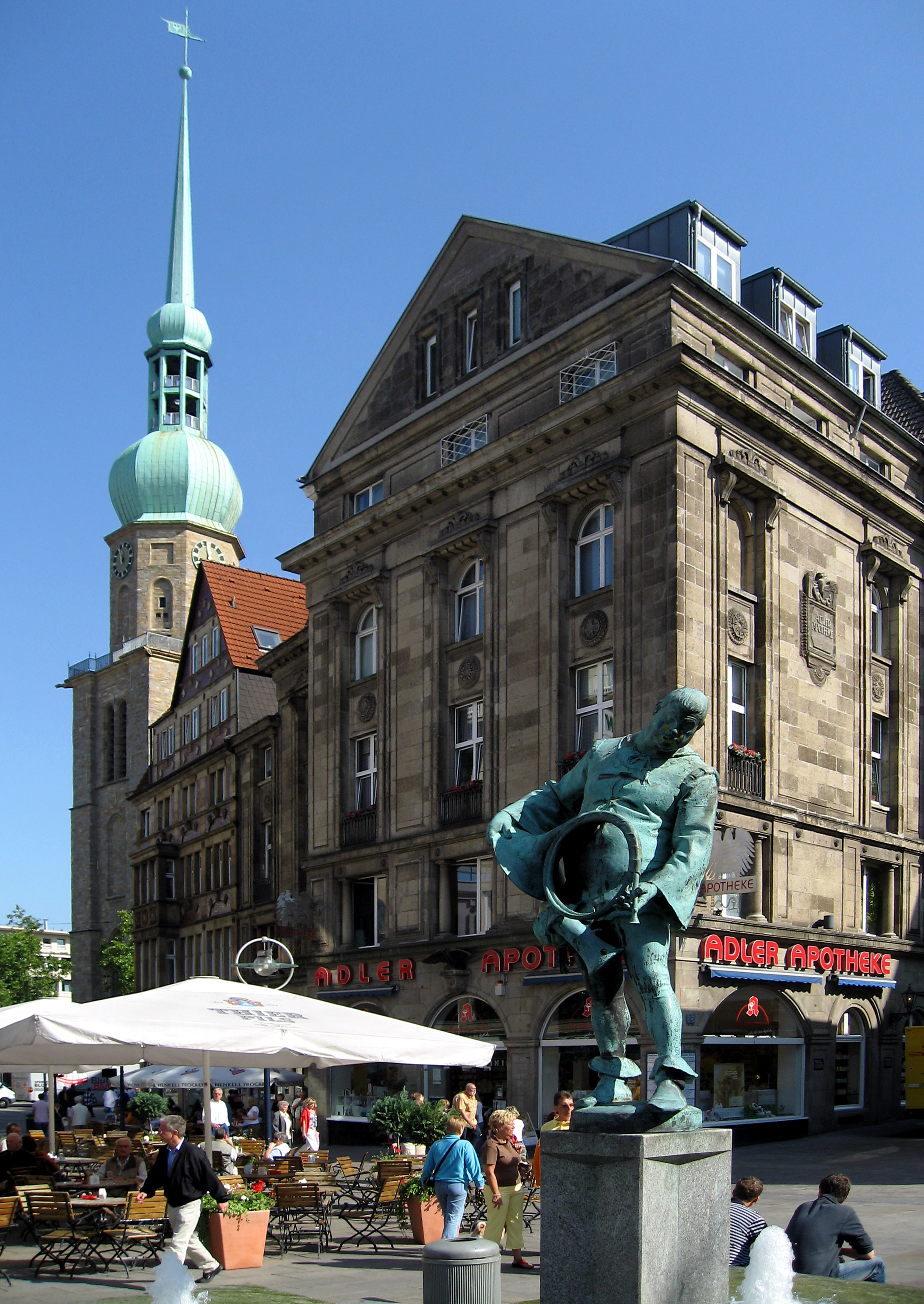 Turm der Reinoldikirche vom Bläserbrunnen aus Richtung Norden, Alter Markt